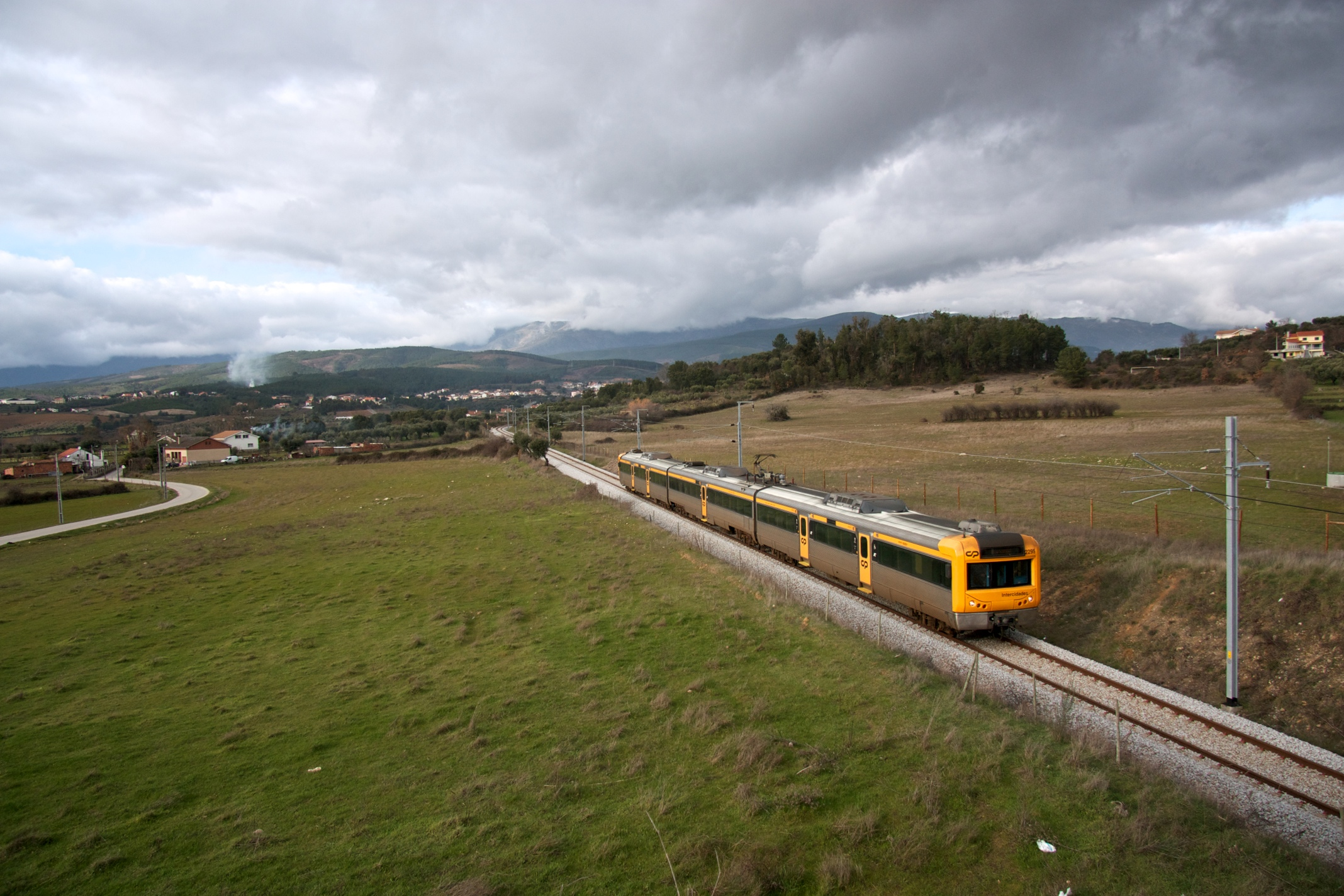 Tipo: Comboio Intercidades 542 [Covilhã - Lisboa • Santa Apolónia] Local: Alcaria [Linha da Beira Baixa, PK 154] Data e hora: 30 de Dezembro de 2012 [14h44] Material: Automotora 2295 [Unidade Tripla Eléctrica]